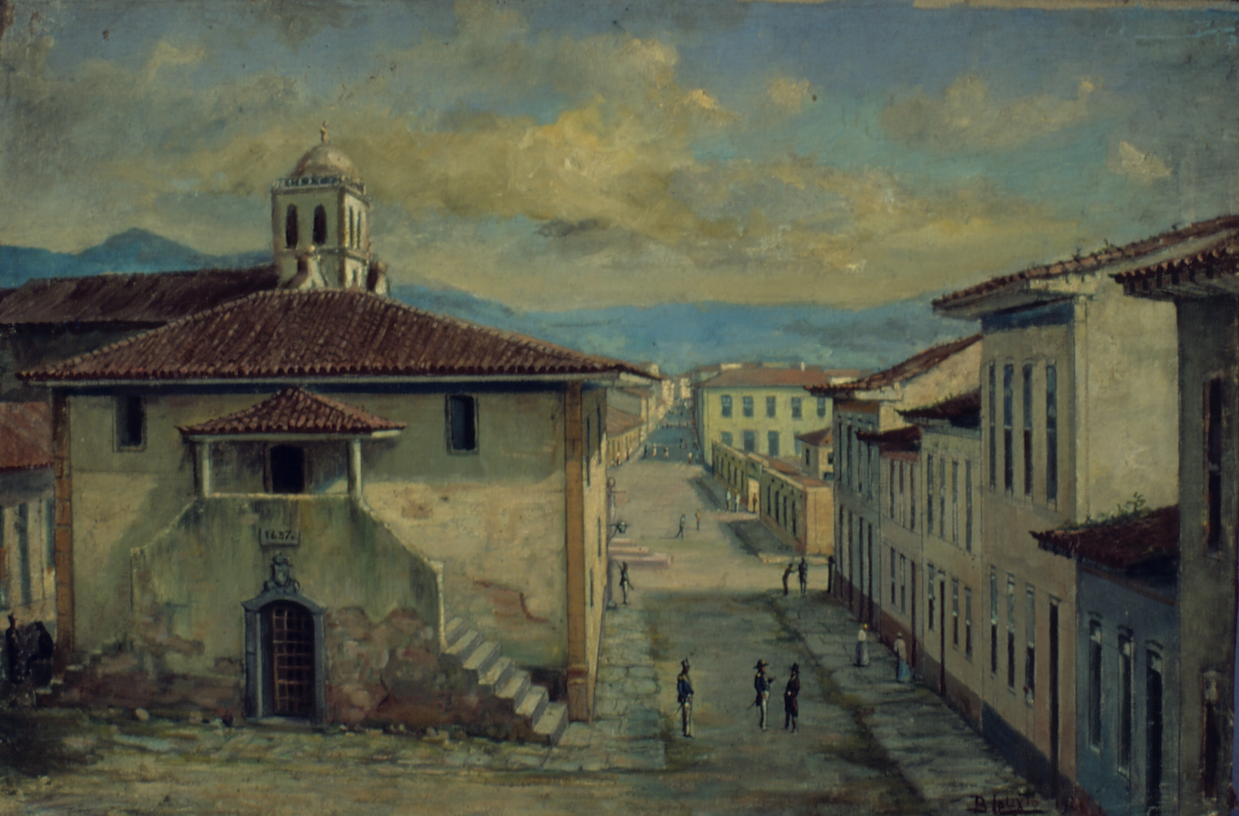 Obra que integra o acervo do Museu Paulista da USP. Coleção Benedito Calixto de Jesus - CBCJ